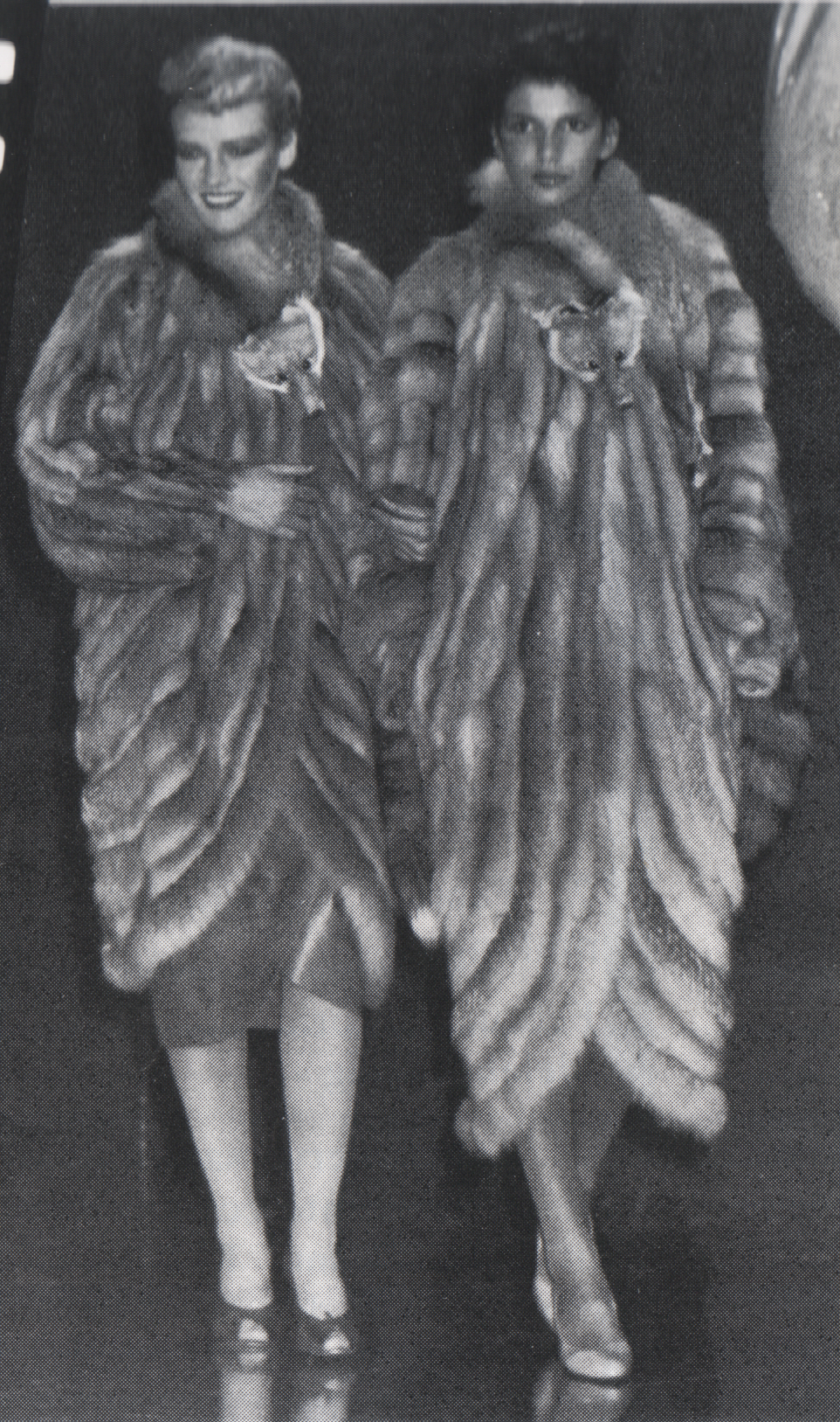 Fuchsmäntel, Design Wolfgang Joop für Wolfgang Müller, Frankfurt am Main. Chefin der Modellabteilung Müller-Tochter Renate Senf. Vorgeführt zur Modenschau anlässlich des 65. Geburtstags des Pelzkonfektionärs Heinz Müller, seit 1945 tätig in Frankfurt am Main (geb. 5. Dezember 1914) im Bankettsaal des „Hotel Frankfurter Hof“.